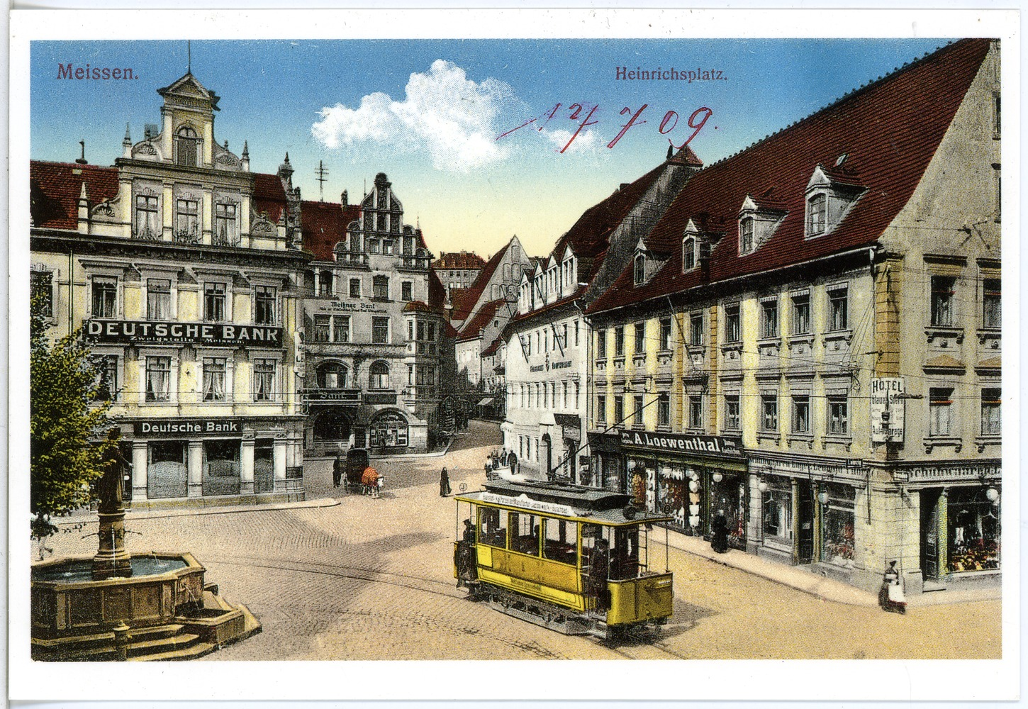 Meißen; Heinrichsplatz This postcard is from publisher Brück & Sohn in Meißen ( postcard has a unique number 17709 and is available in a higher resolution at the publisher. This images was uploaded in a cooperation project between Wikipedians and the publisher.